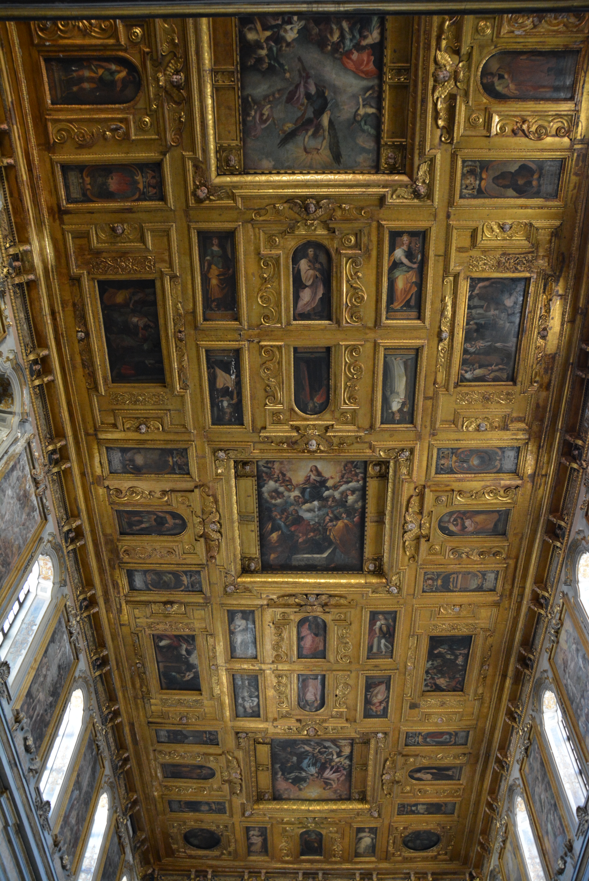 Soffitto della chiesa di Santa Maria la Nova a Napoli